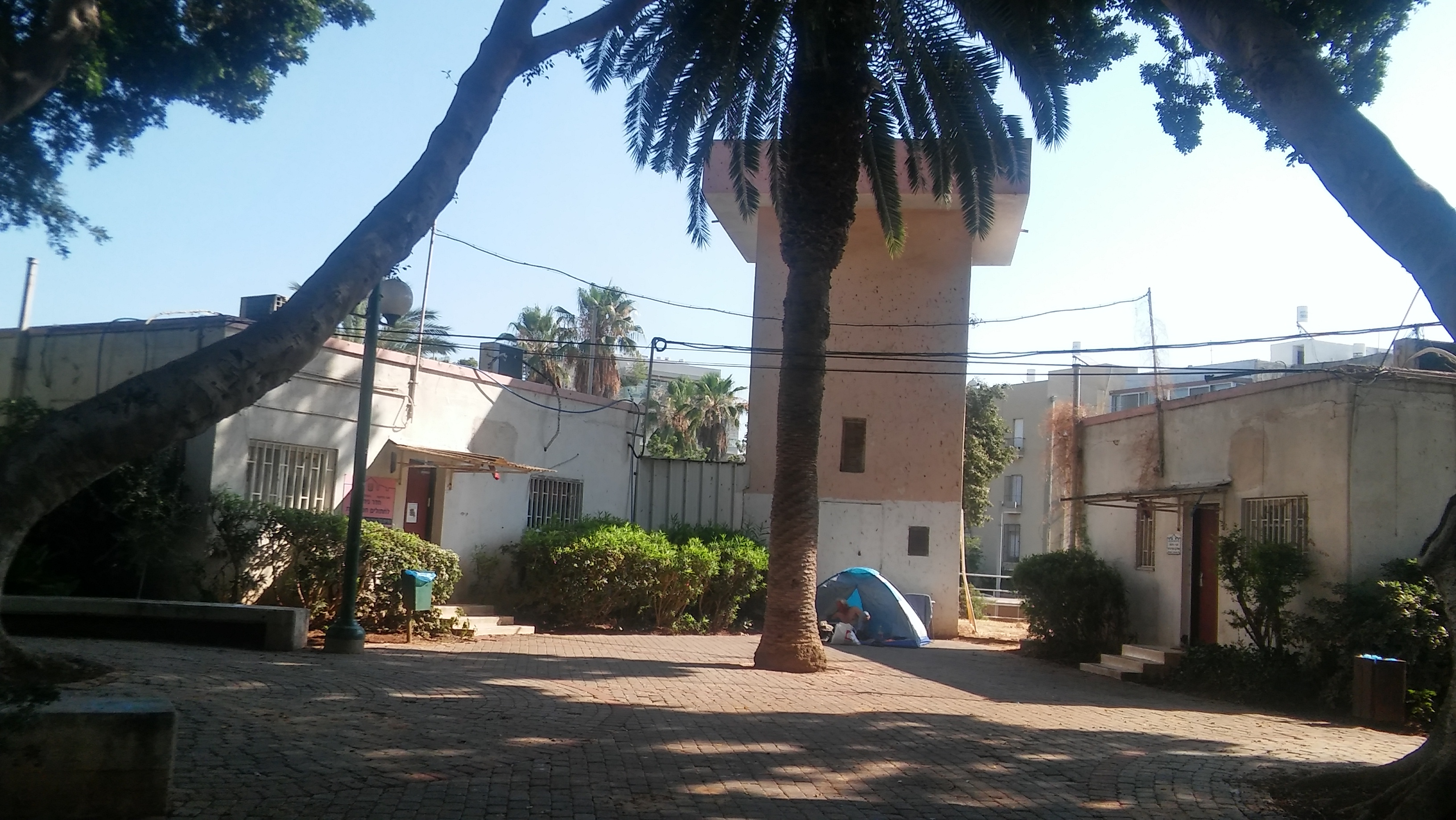 בית המטבחיים הישן של תל אביב